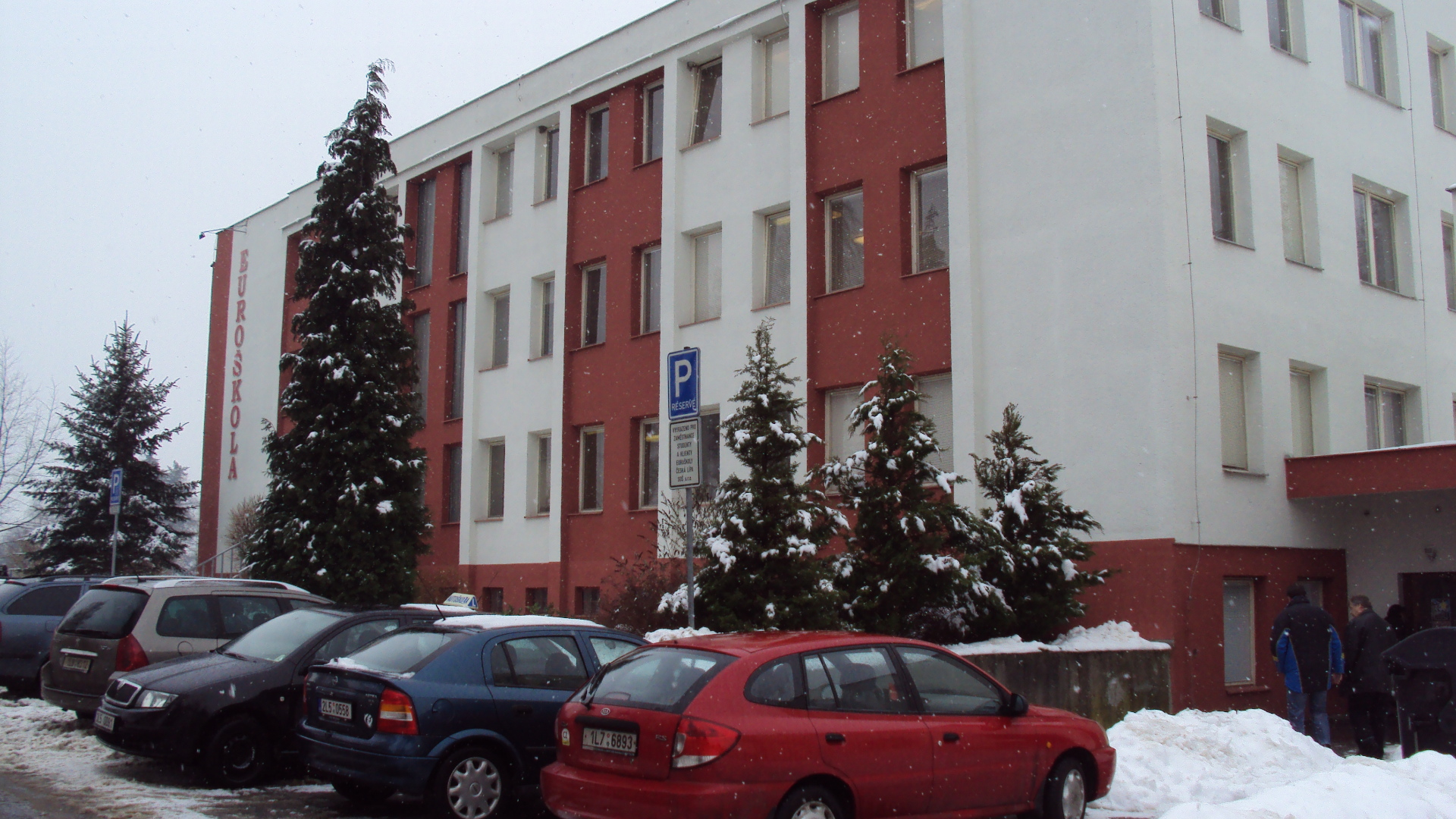 Česky: Budova Euroškoly v České Lípě